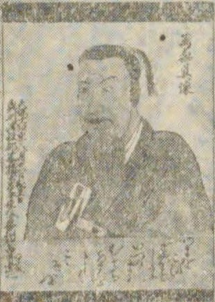 津軽親足の自画像(モノクロ)。